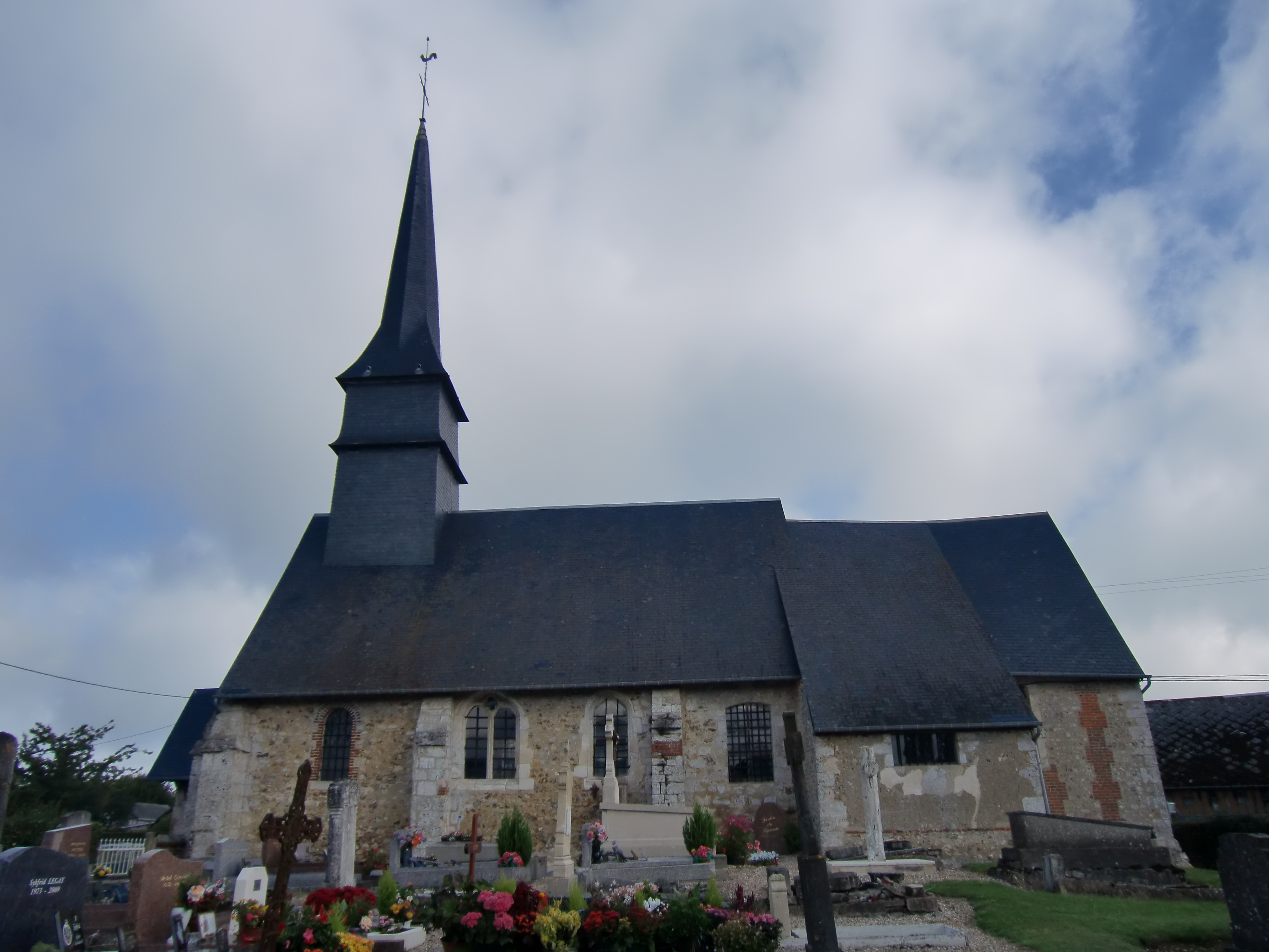 église de La Chapelle-Bayvel (Eure, Normandie, France)